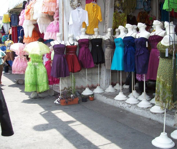 Uriangato, la ropa que se vende en esta ciudad.